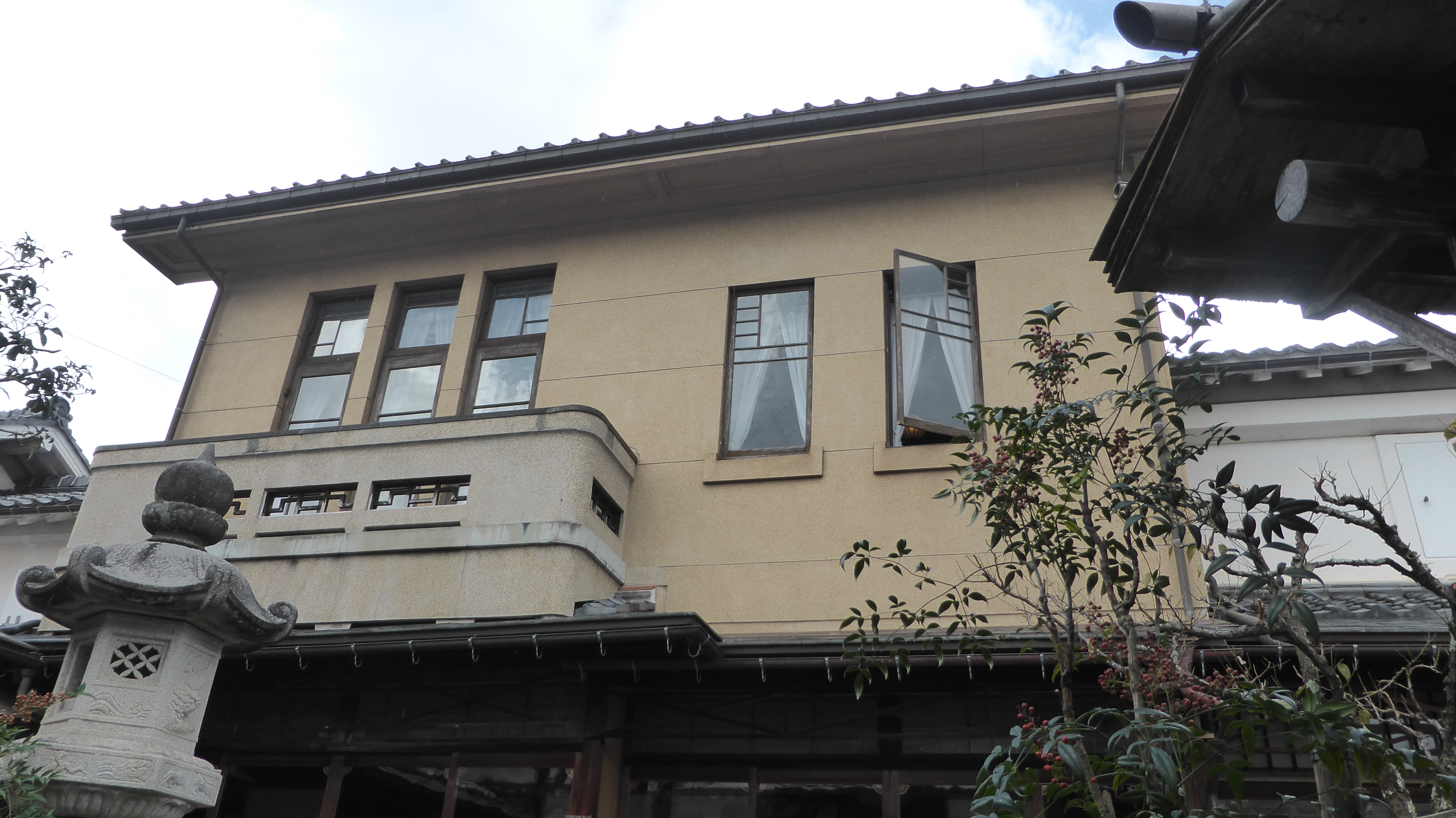 1階が日本家屋、2階が洋館となっている珍しい設計。